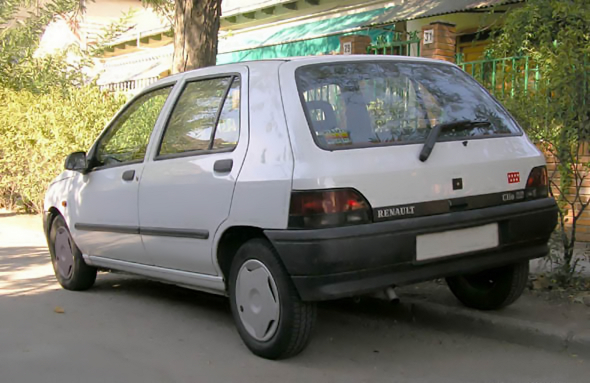 Renault Clio 1 Fase I, 1.2 RN de 1992